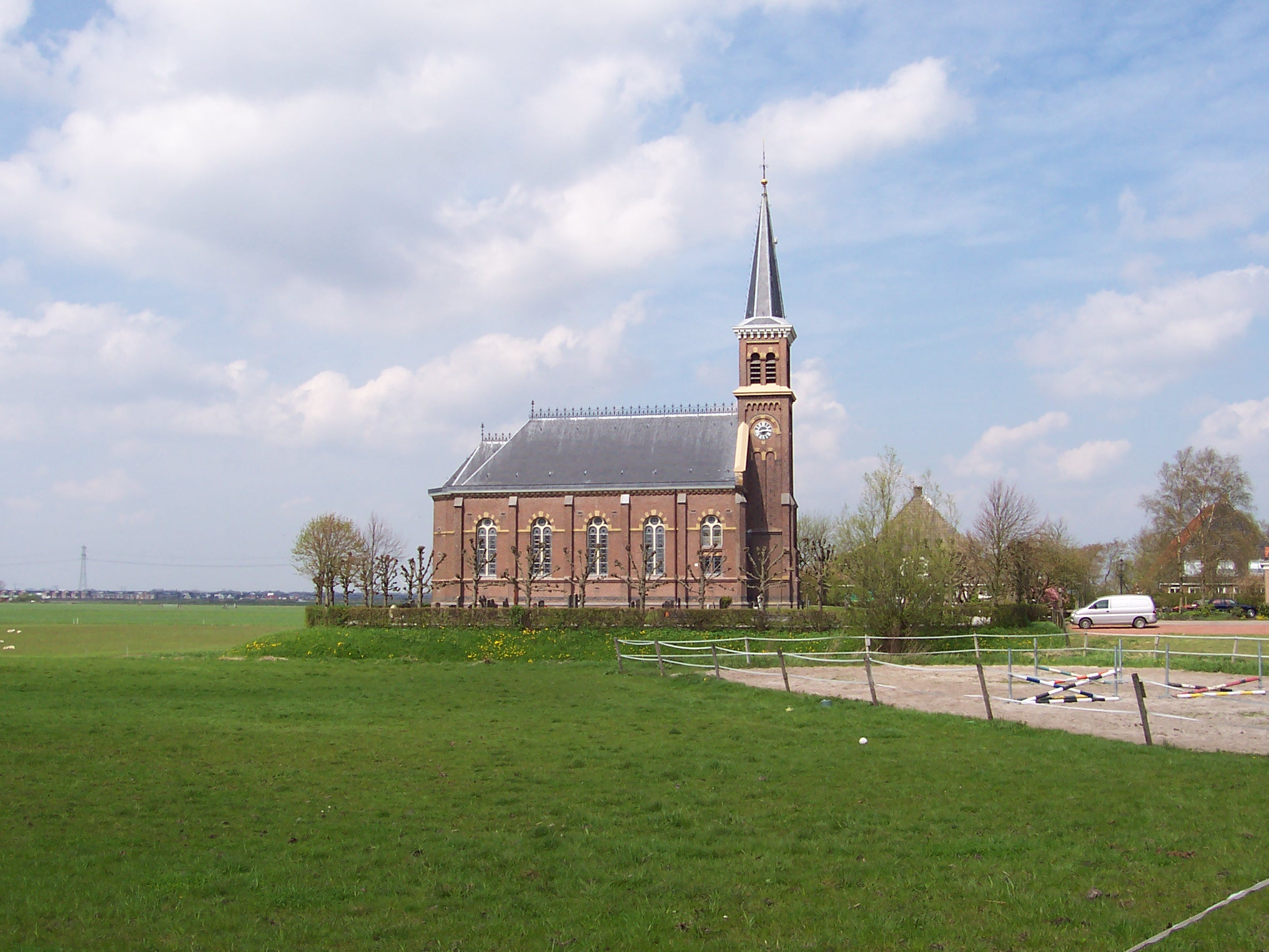 Warstiens, tsjerke